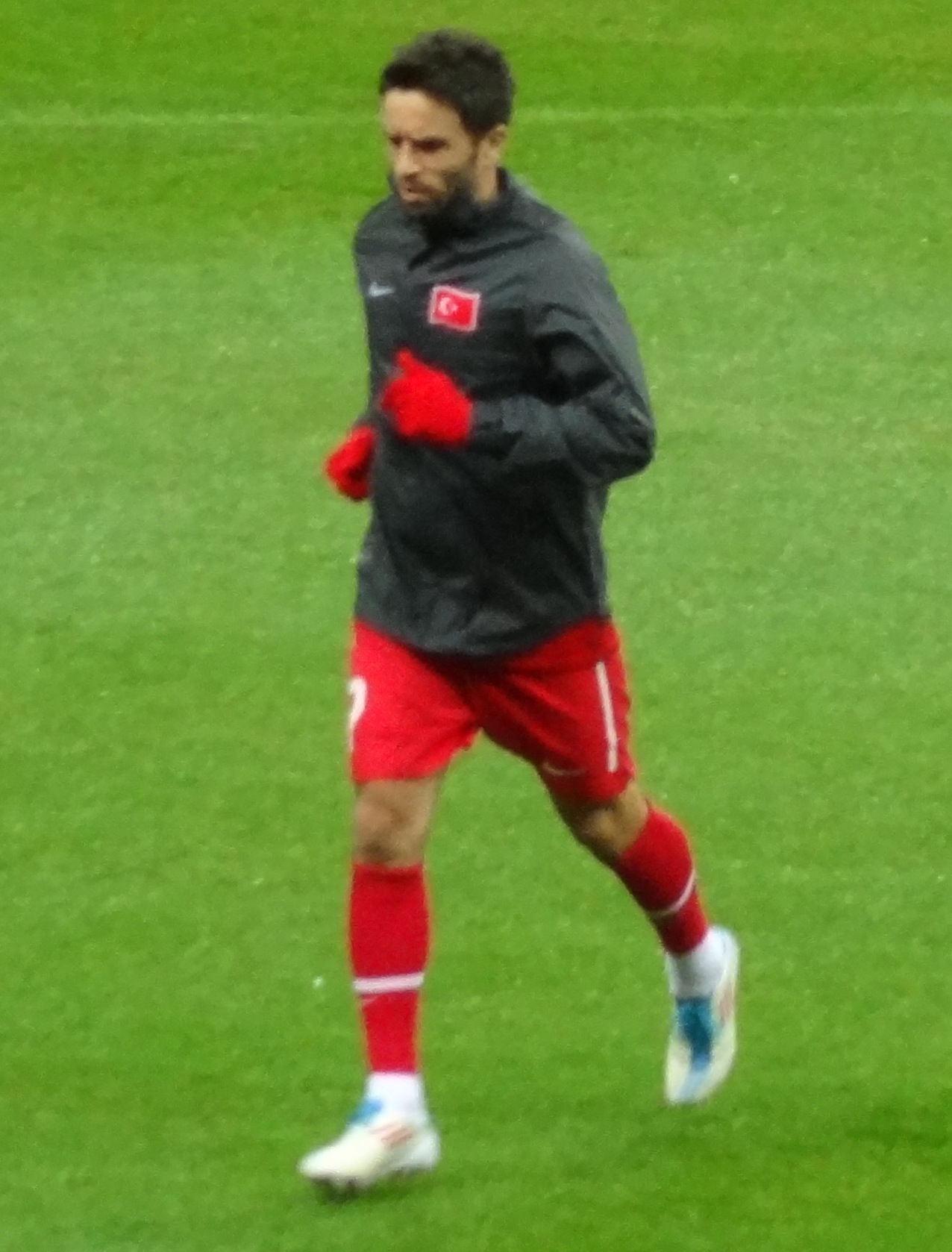 Gökhan Gönül Türkiye forması giyerken.